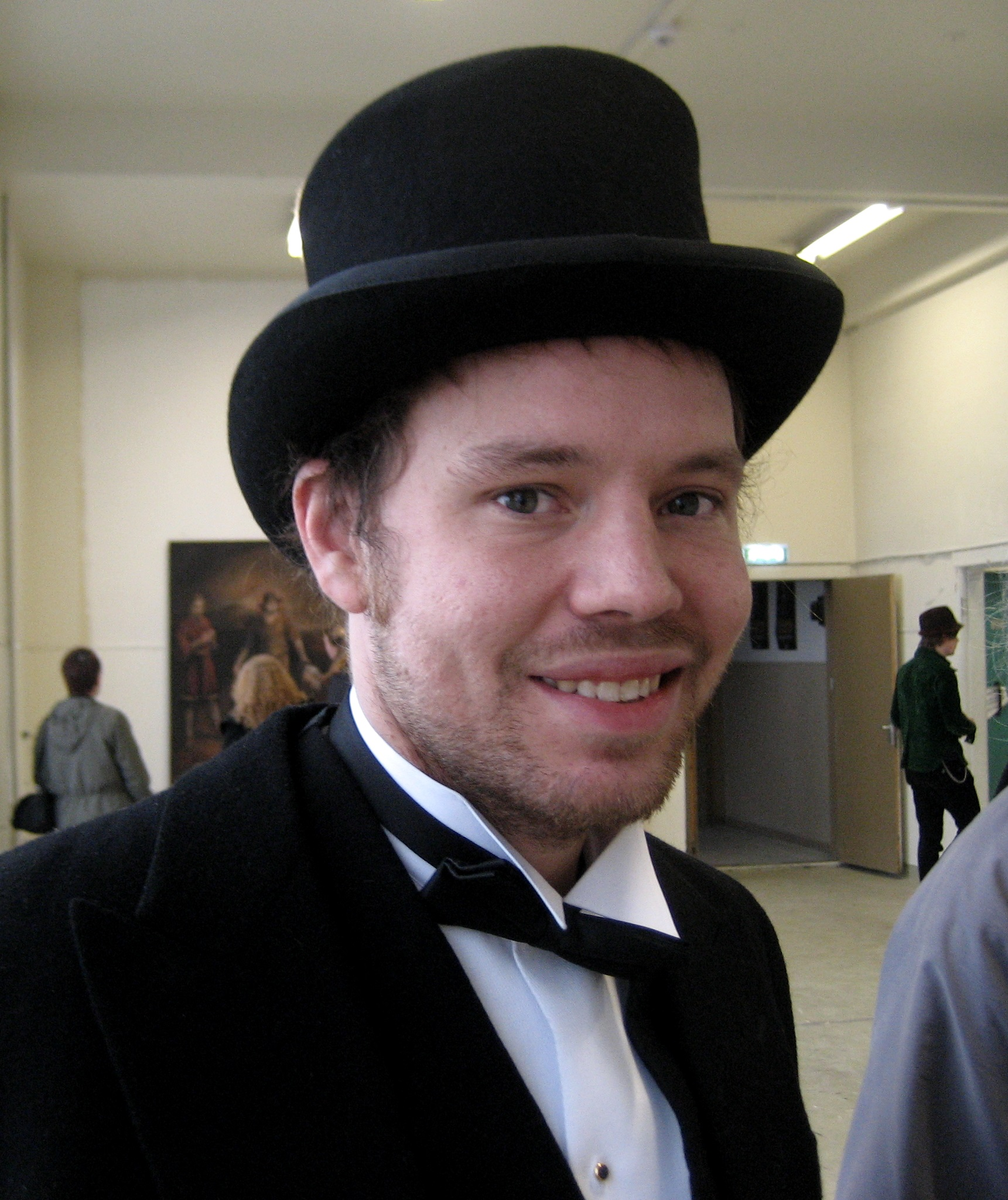 Þrándur við opnun málverkasýningar sinnar 2008